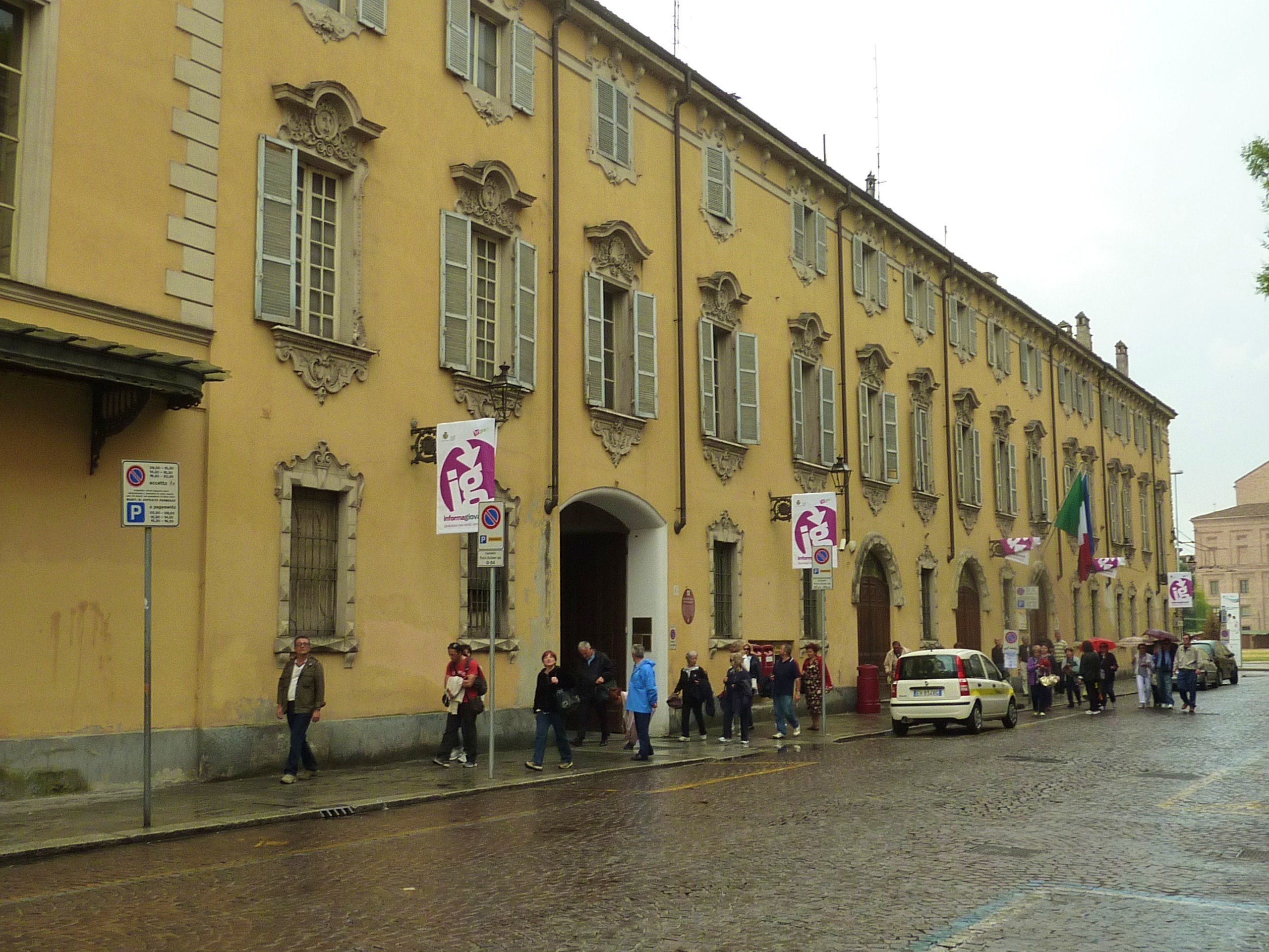 Il lato nord del Palazzo di Riserva di Parma, lungo via Melloni.